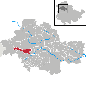 Oberdorla in Thuringia - Unstrut-Hainich-Kreis